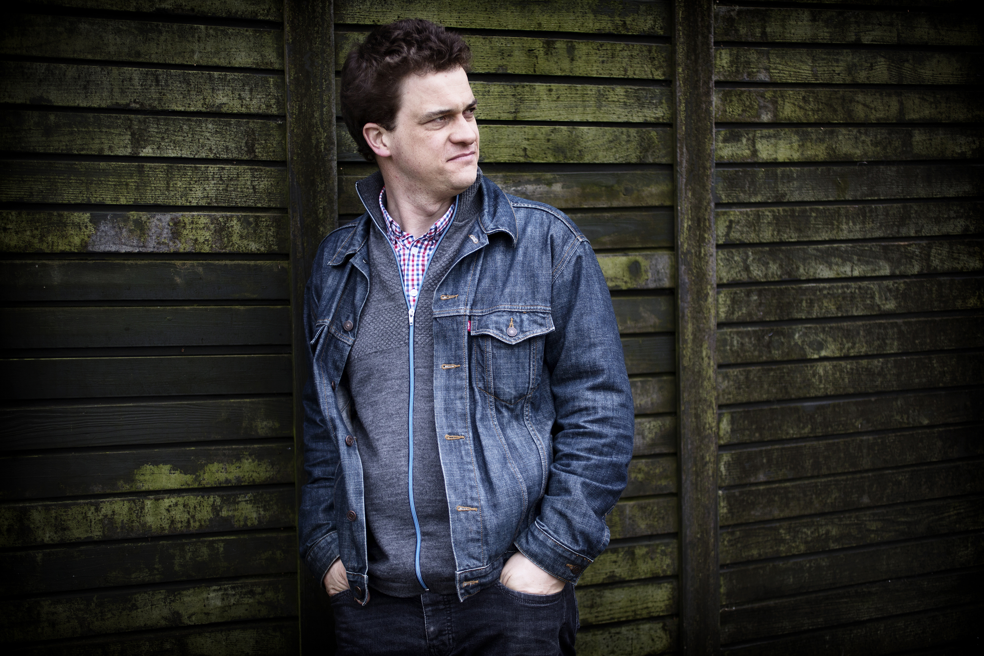 Författaren och journalisten Eskil Fagerström.